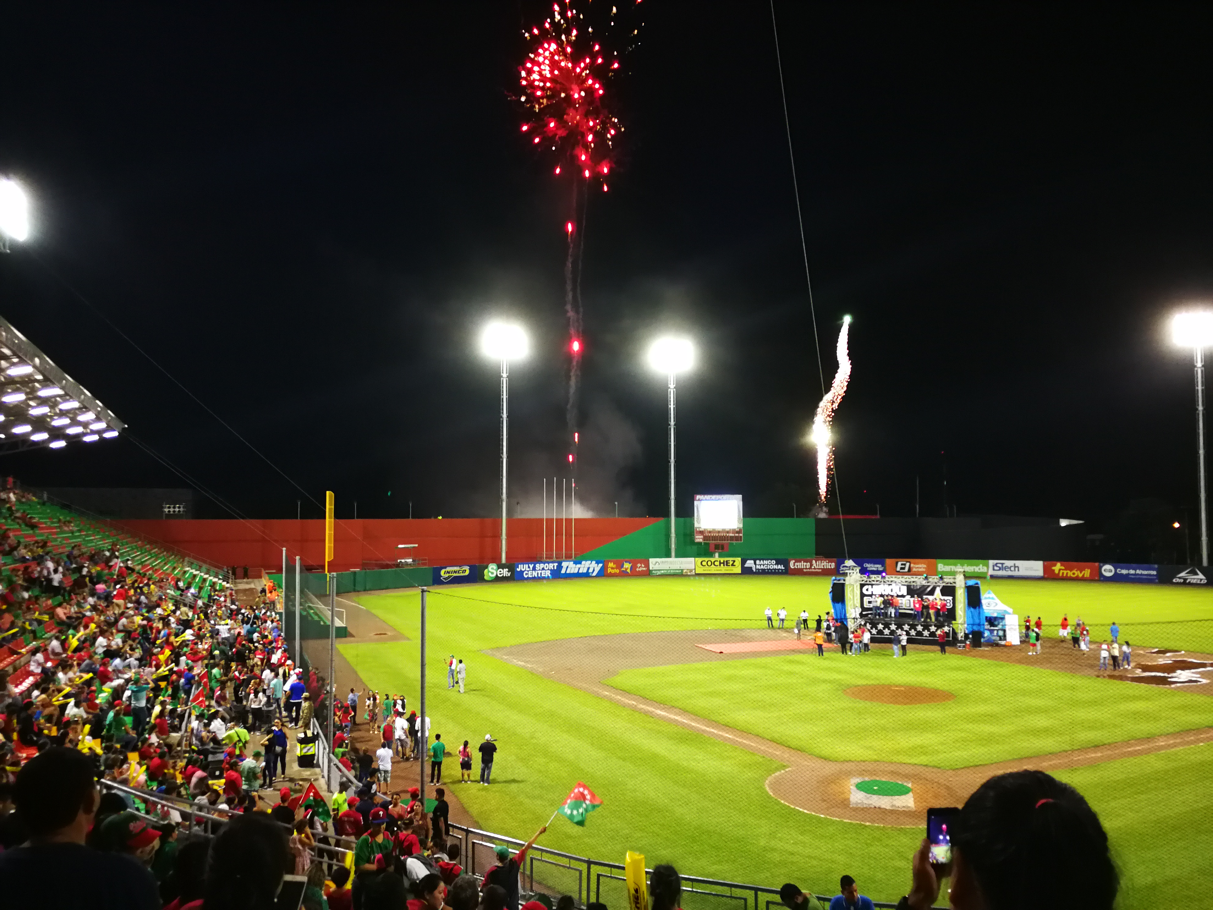 Celebración del Campeonato # 13 orgullo Chiricano